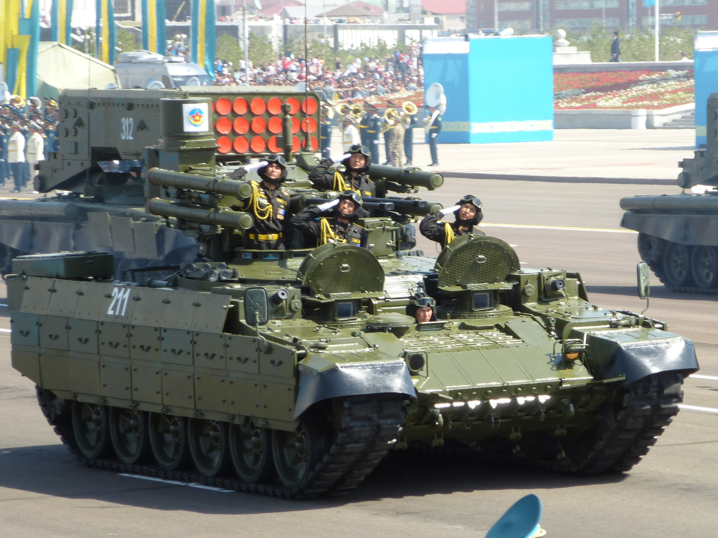 БМПТ "Рамка" на военном параде в г.Нур-Султан 7 мая 2015 года